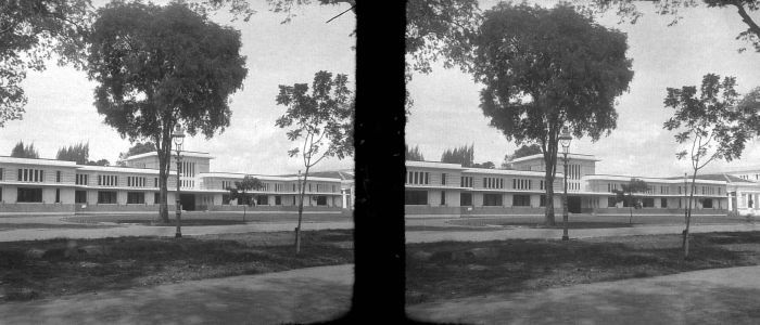 Negatief. Gebouw van de Rechtshogeschool te Weltevreden, Java